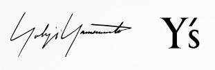 Yohji Yamamoto corporate logos